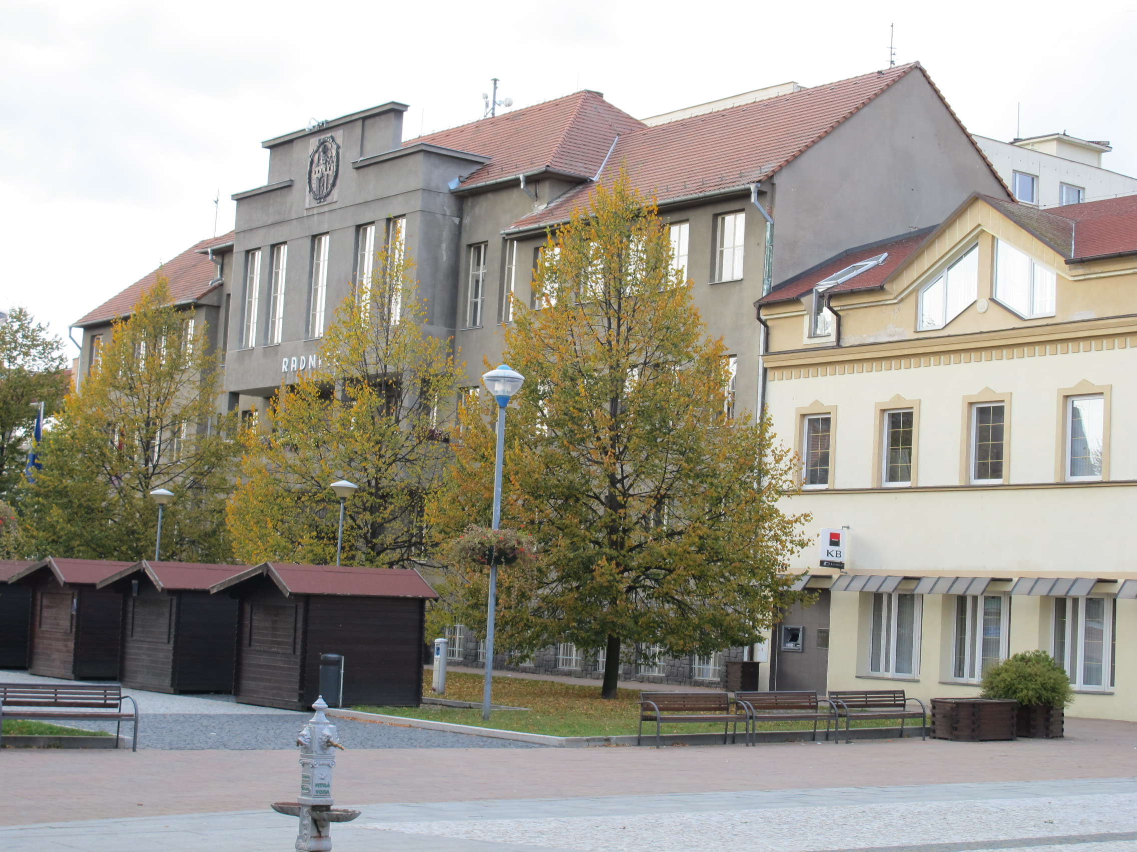 Budova litvínovské radnice na náměstí Míru